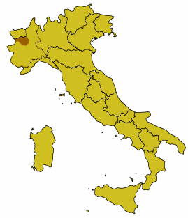 Canavese